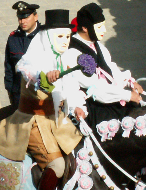 Oristano, Sartiglia, Cumponidori, pippia de maju